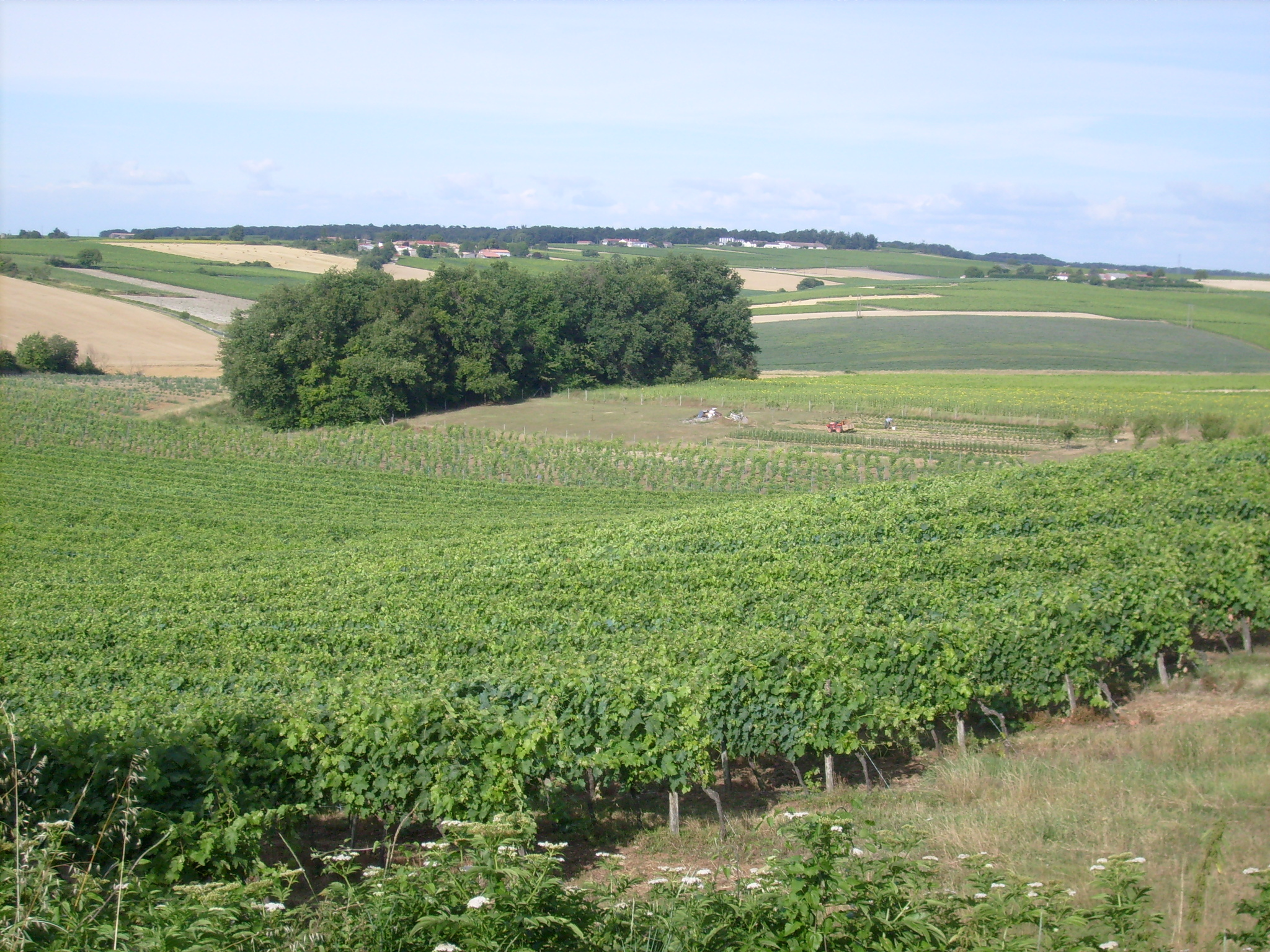 Vignobles à Saint-Thomas-de-Cônac